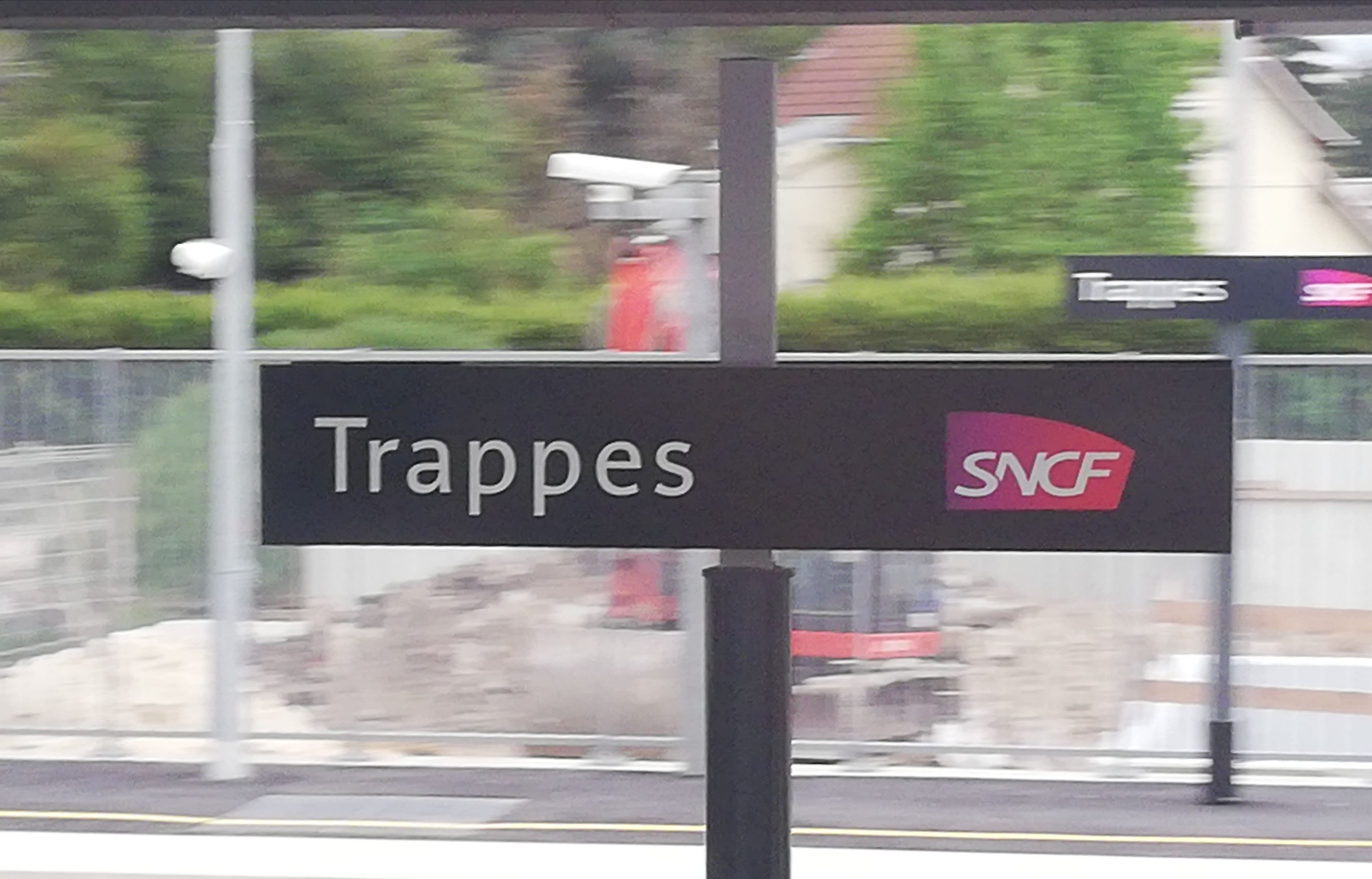 Plaque signalétique de la gare de Trappes des lignes N et U du Transilien, en 2019.